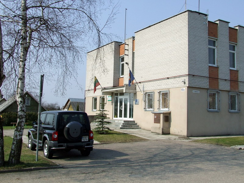 Karmėlavos savivaldybės, bibliotekos ir policijos pastatas.